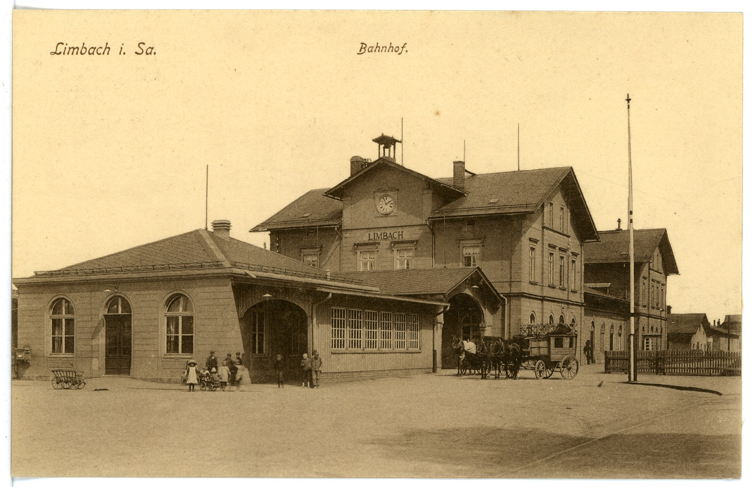 Limbach; Bahnhof This postcard is from publisher Brück & Sohn in Meißen ( postcard has a unique number 15766 and is available in a higher resolution at the publisher. This images was uploaded in a cooperation project between Wikipedians and the publisher.